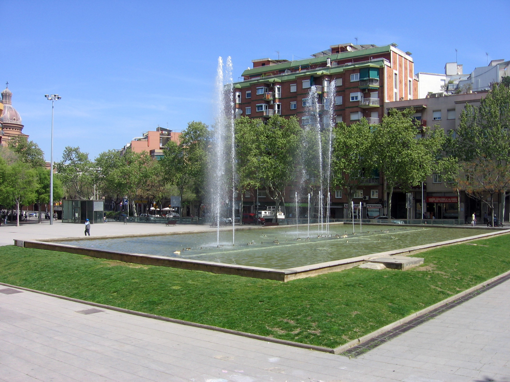 Fuente cibernética de Can Fabra (1995), de Ramon Llopart, Jardines de Can Fabra.